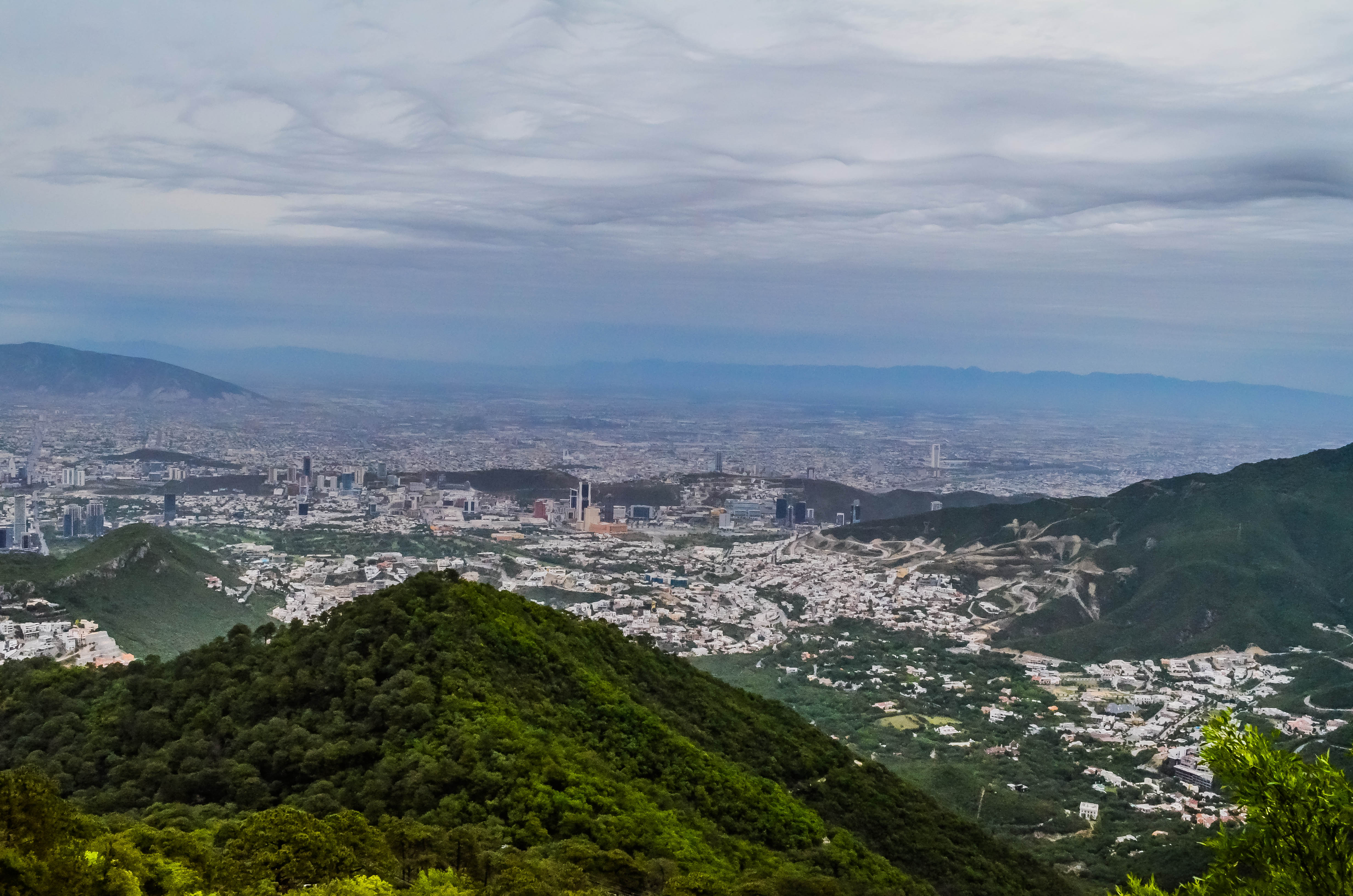 San Pedro Garza García, 2014.